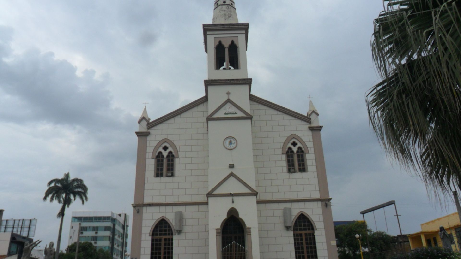 BARREIRAS BAHIA